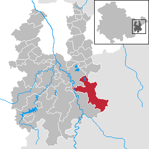 Mohlsdorf-Teichwolframsdorf im Landkreis Greiz, Thüringen